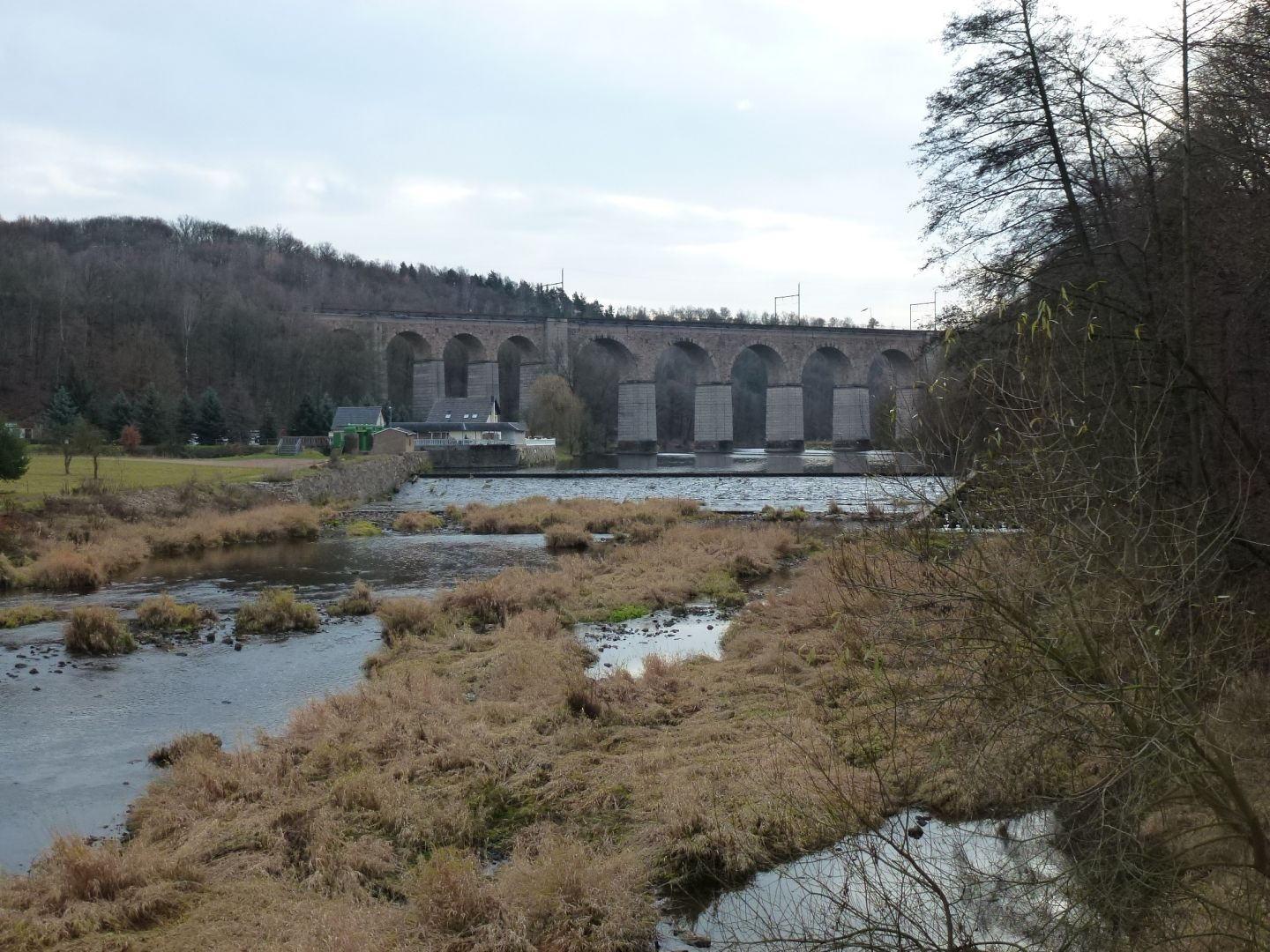 Eisenbahnviadukt in Limmritz über die Zschopau